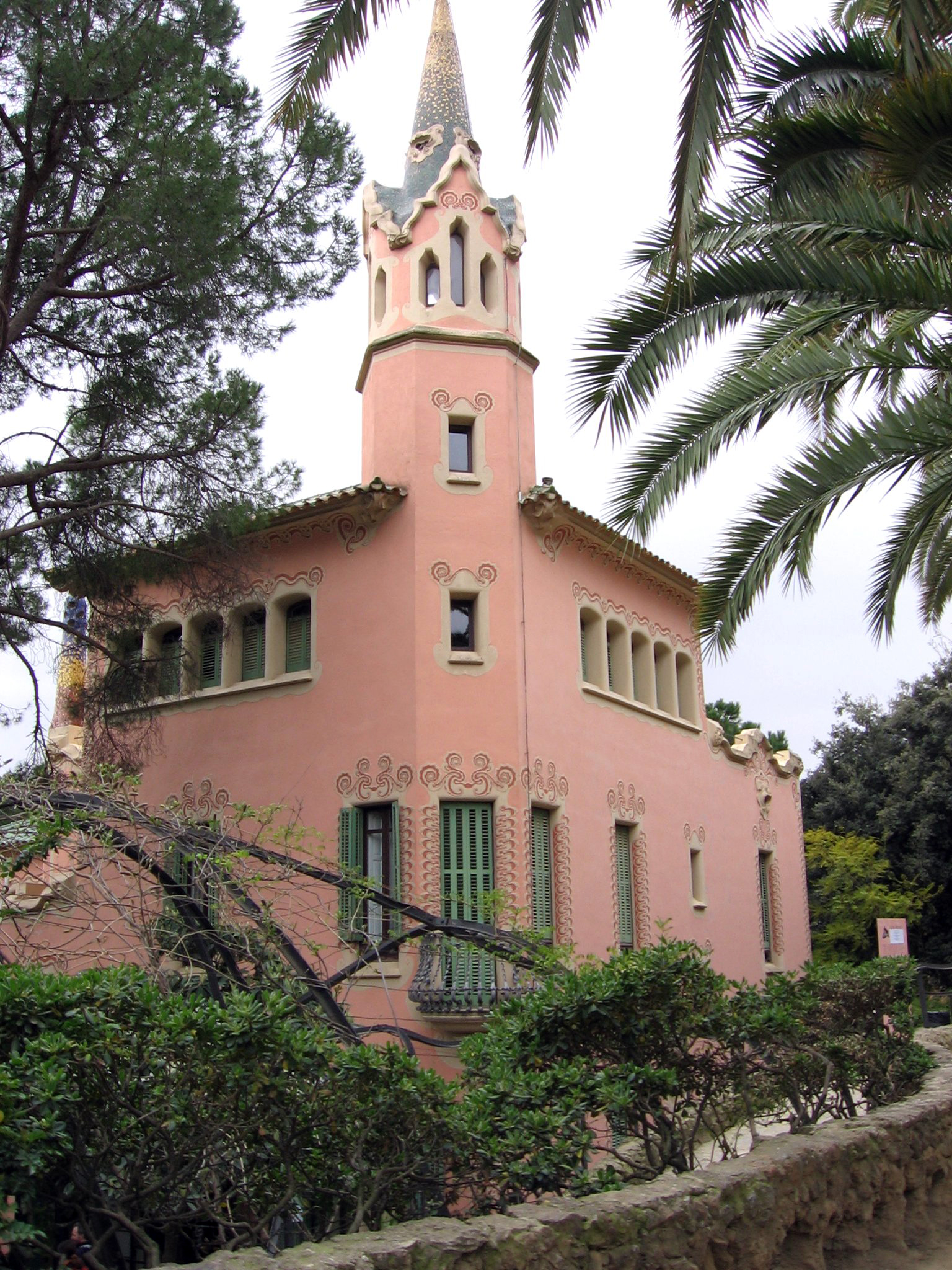 Park Güell - Casa-Museu Gaudí